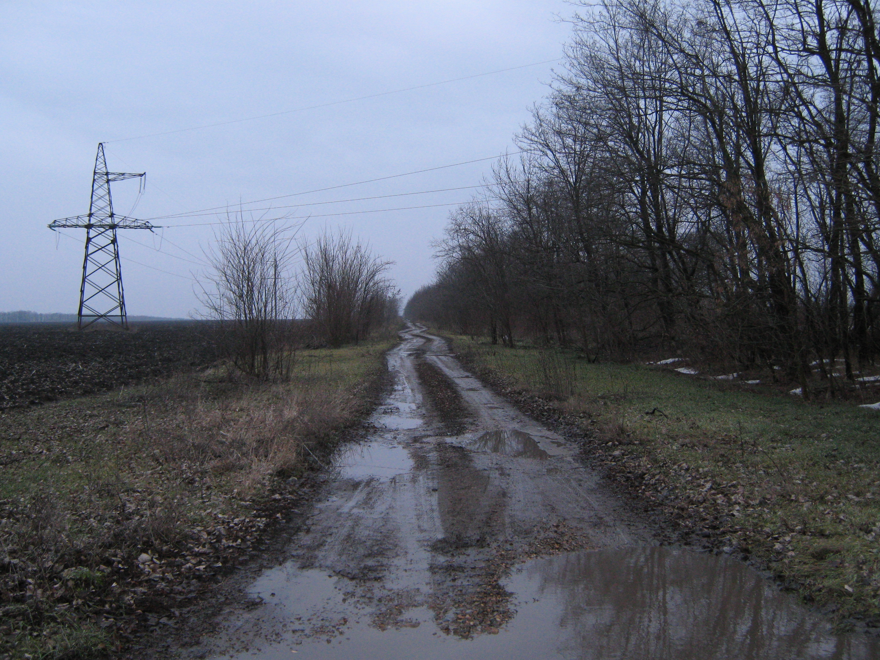 Krylovsky District, Krasnodar Krai, Russia